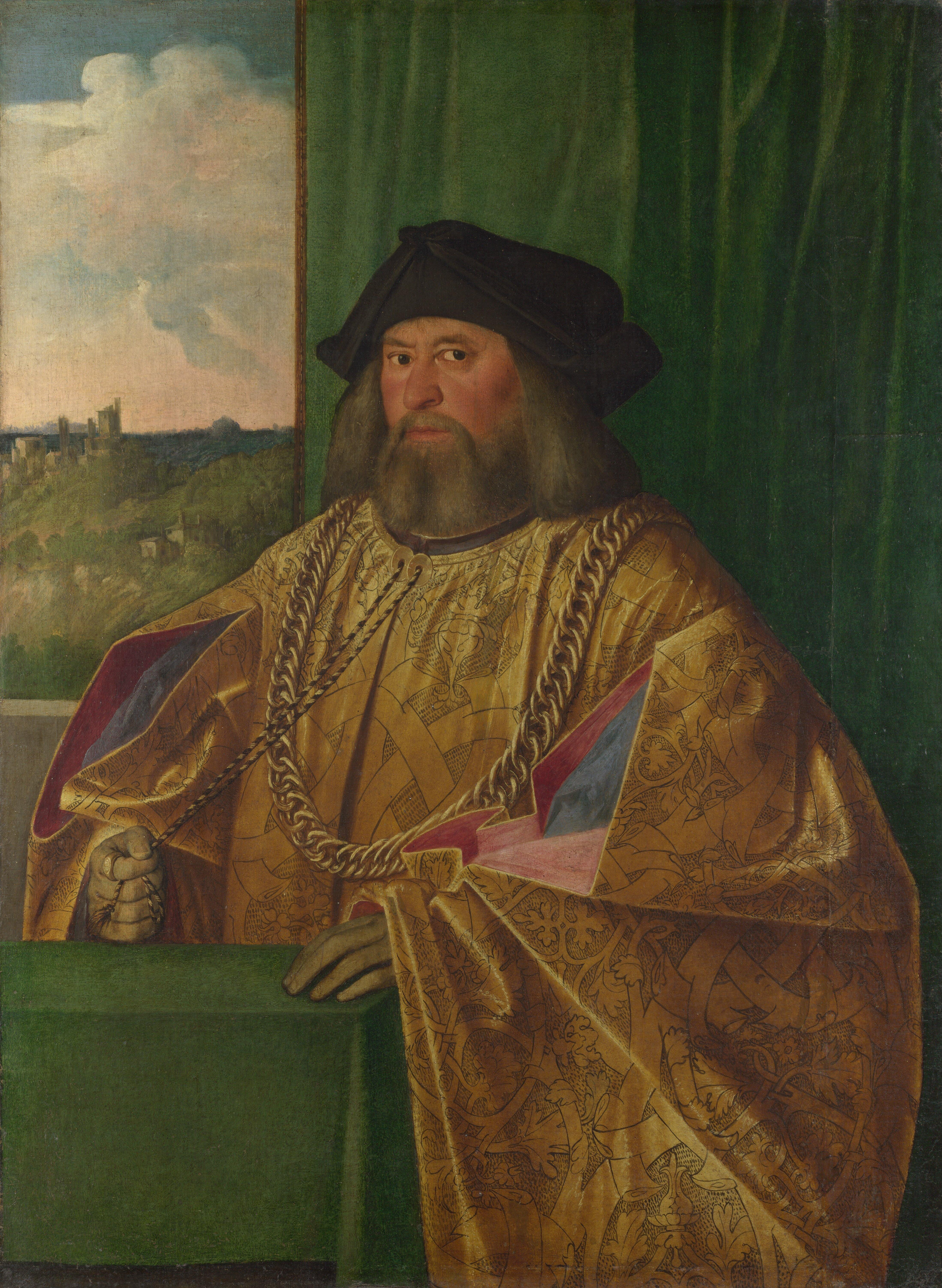 Francesco Albani // NG, London